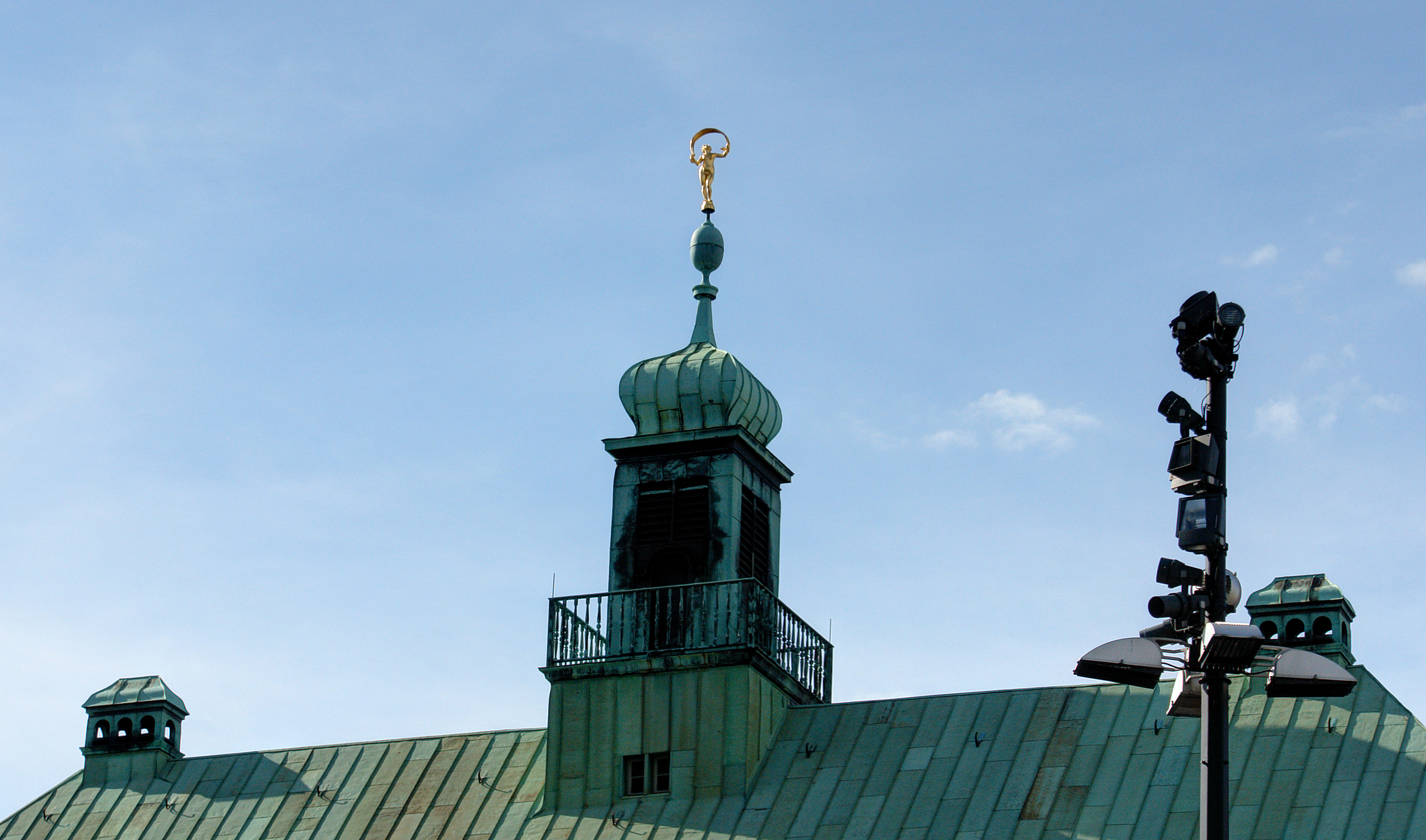 Neues Rathaus in Bremen, Glücksgöttin Fortuna (Bildhauer: Georg Roemer) als Wetterfahne auf dem DachreiterDas abgebildete Objekt ist ein geschütztes Kulturdenkmal in der Freien Hansestadt Bremen, mit der Nr. 0066,T003 beim Landesamt für Denkmalpflege registriert.